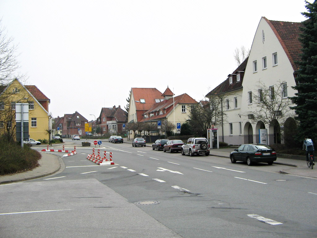 Bomlitz seen from Gate 1 of Dow Wolff Cellulosics, Niedersachsen, Germany